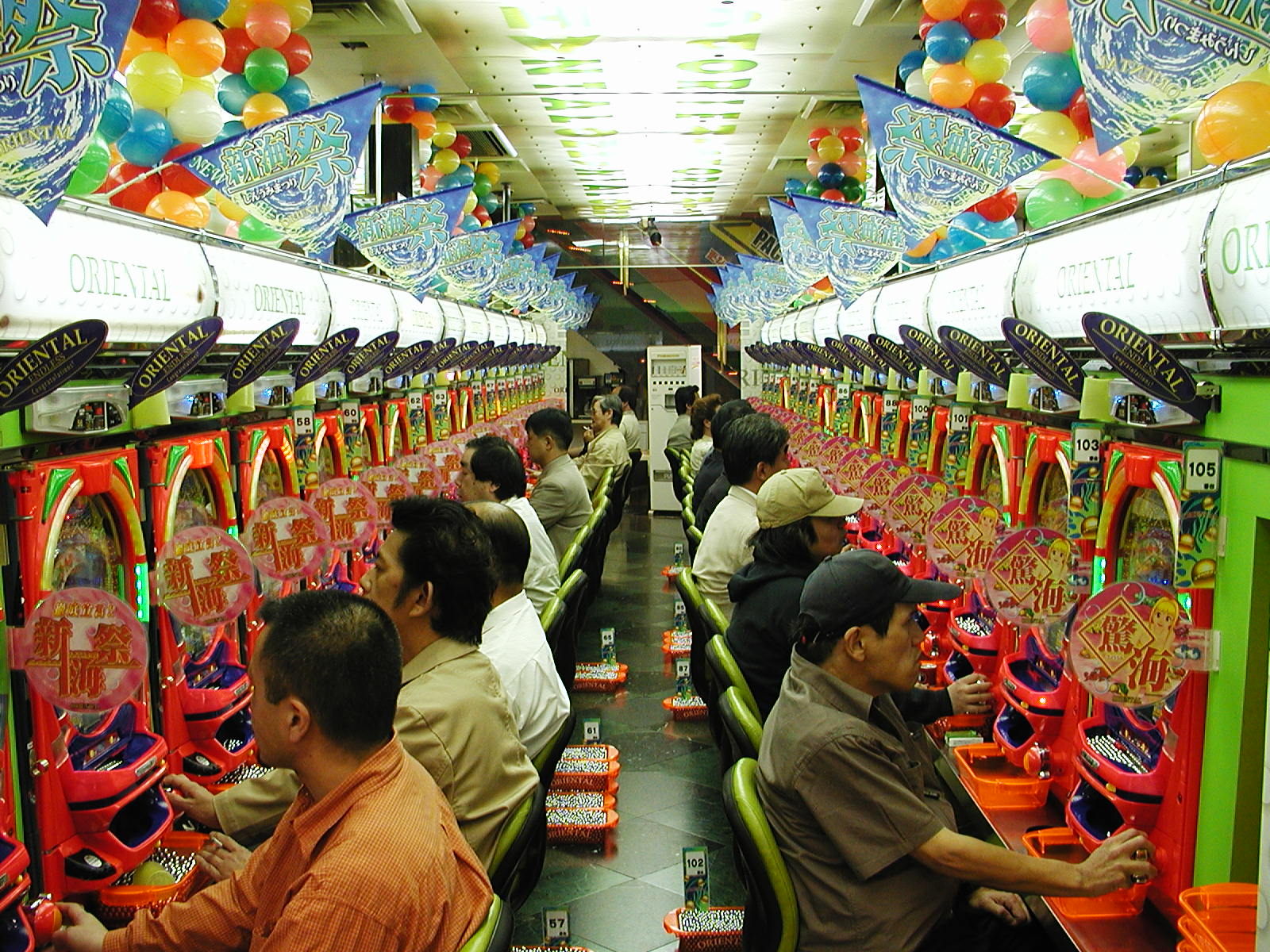 Tokyo (Japan): Pachinko-Game